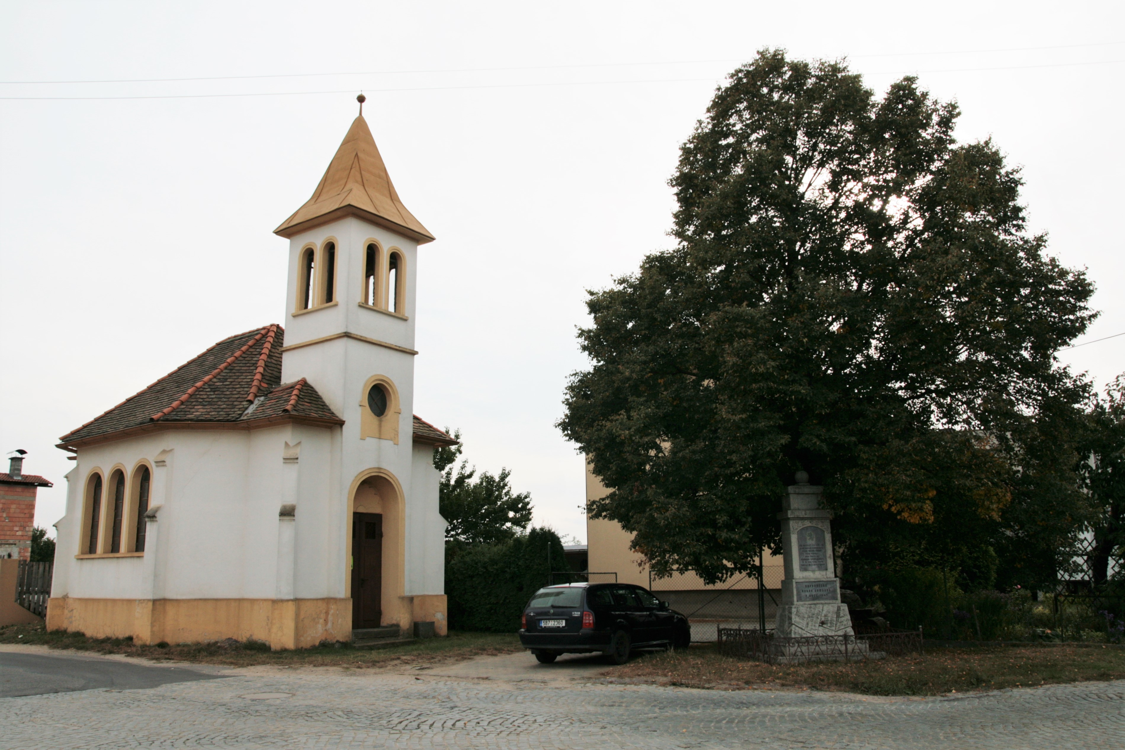 Oblekovice, část okresního města Znojmo v Jihomoravském kraji. Kaple a památník osvobození na křižovatce v Bohumilicích.